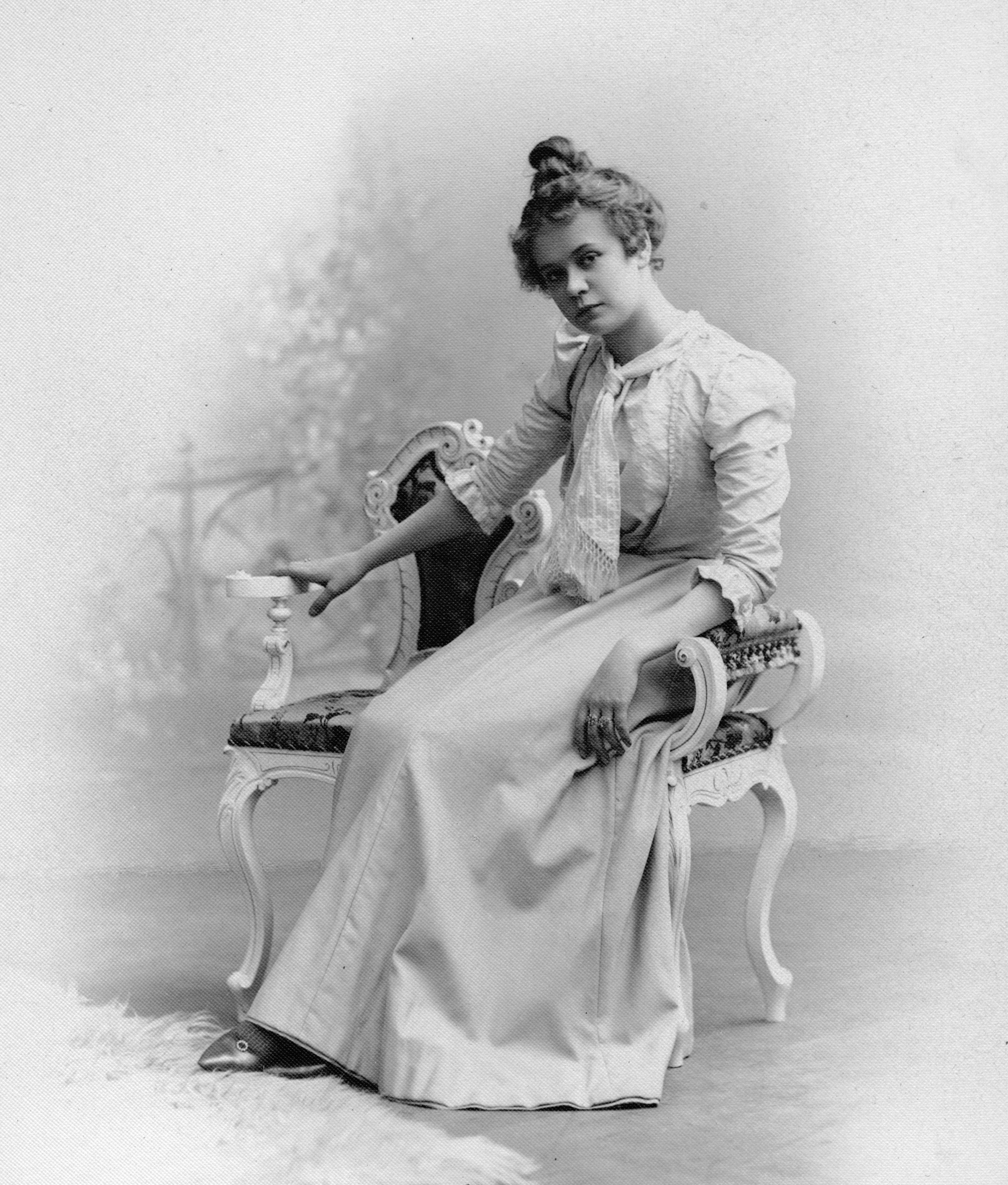 Hildur Ljungqvist (later Lithman), Emil Ljungqvists sällskap 1900-01